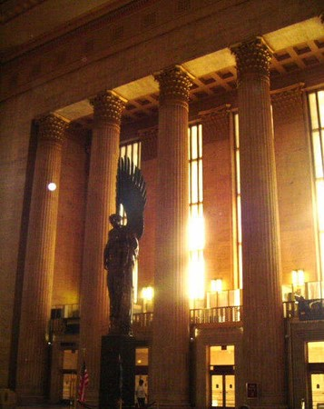 Gare de philadelphie